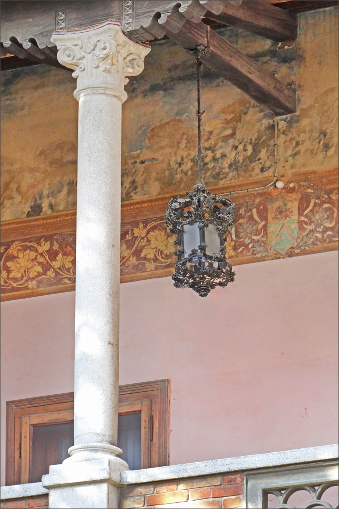 Détail de la grande loggia de la villa Gemma, via Dardanelli Cette villa Liberty, dotée d'une très grande loggia, a été conçue vers 1905-1906 par l'architecte Massimiliano Ongaro pour Gemma Marforio Baucis (Chioccon). Elle est ornée de fresques et de peintures polychromes dont l'état de conservation est inégal, de grilles en fer forgé de belle facture, de lions devant l'entrée.